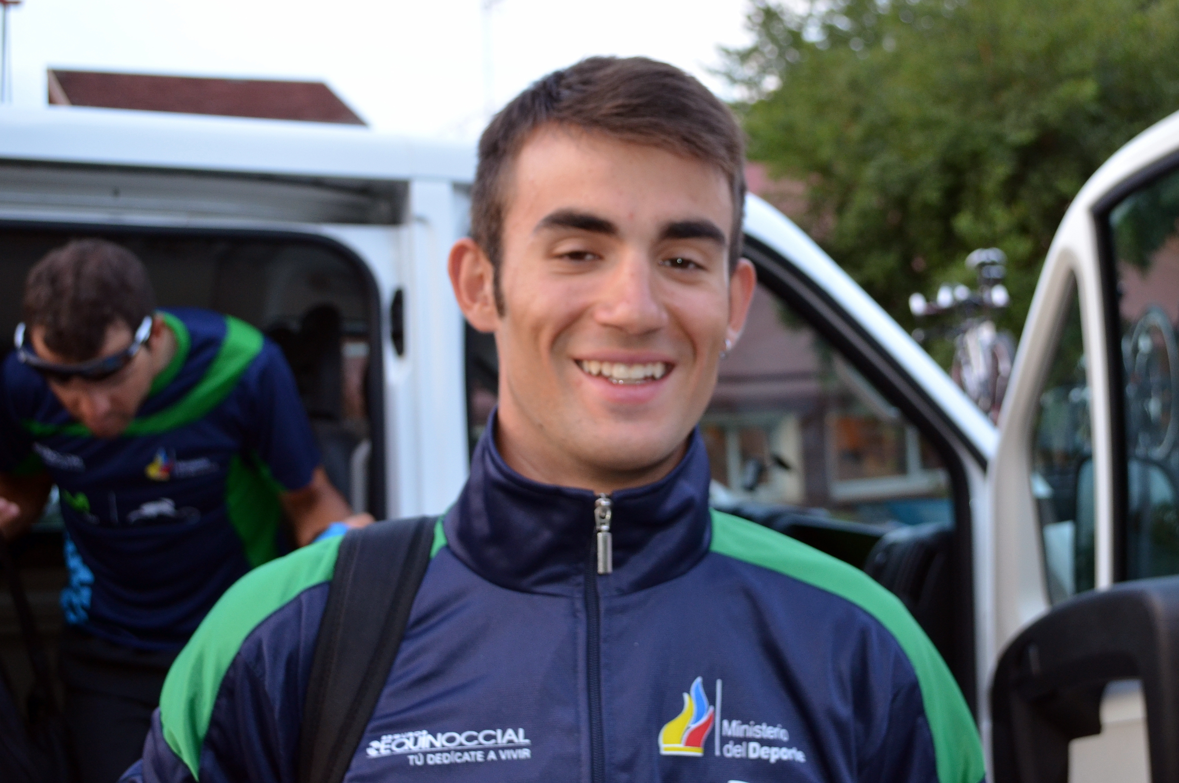 Isaac Carbonell (Movistar Team Ecuador) à l'issue du prologue du Tour de l'Ain 2014, à son hôtel à Bourg-en-Bresse.